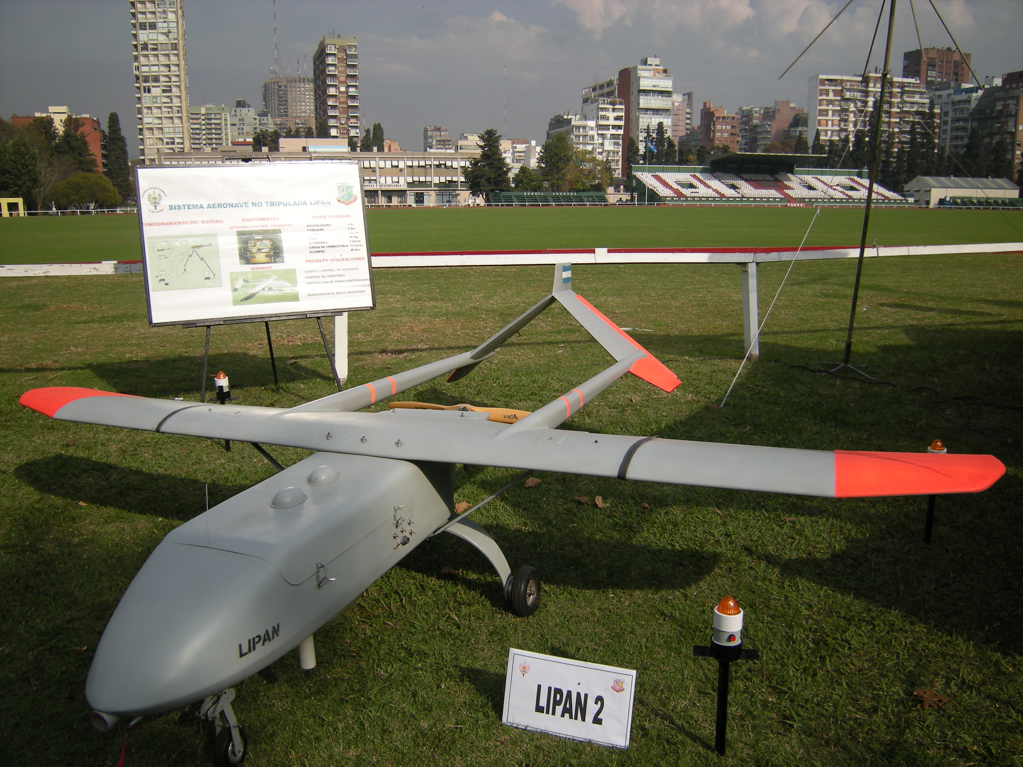 El UAV Lipan II, durante la Exposición del Ejército Argentino realizada en mayo de 2008